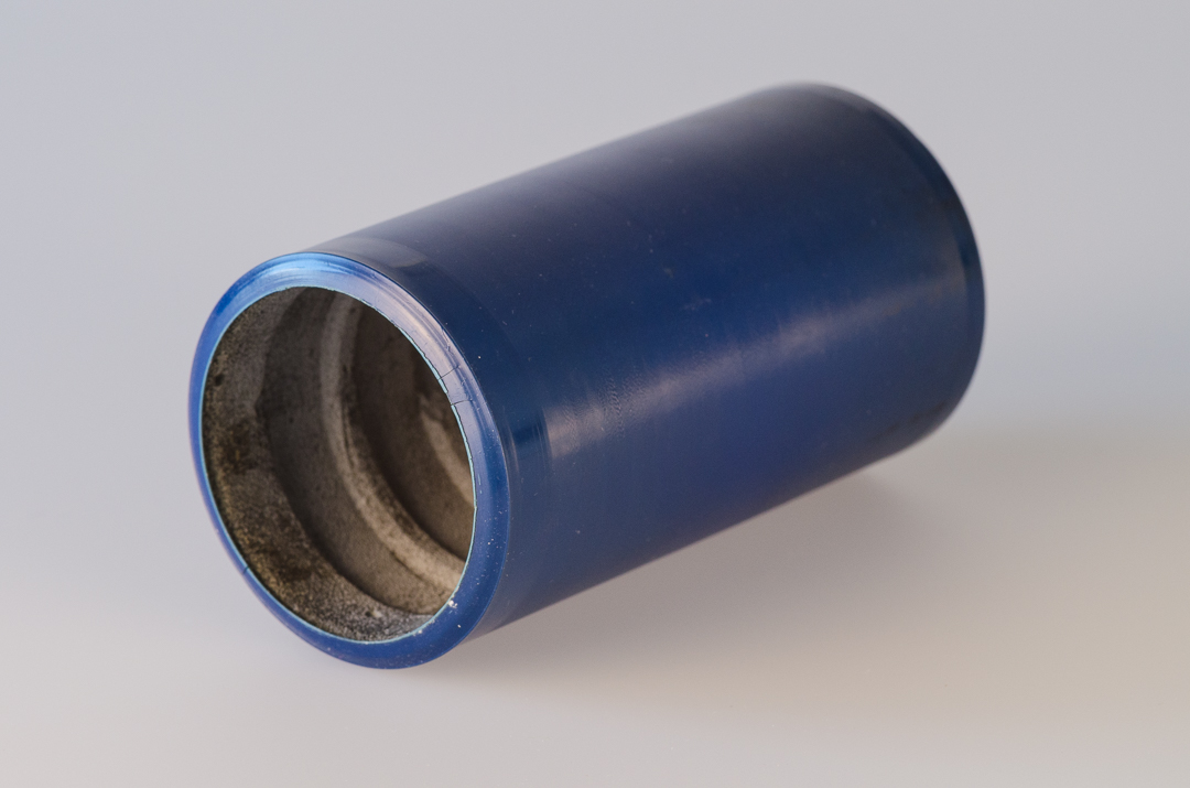 Cilindro in cellulosa